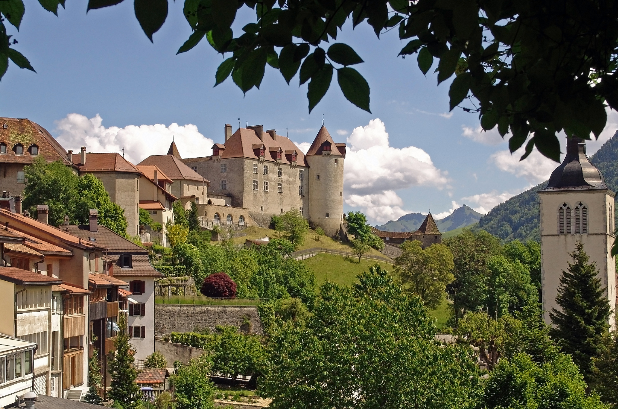 Gruyères, le Chateau - Schloss Greyerz